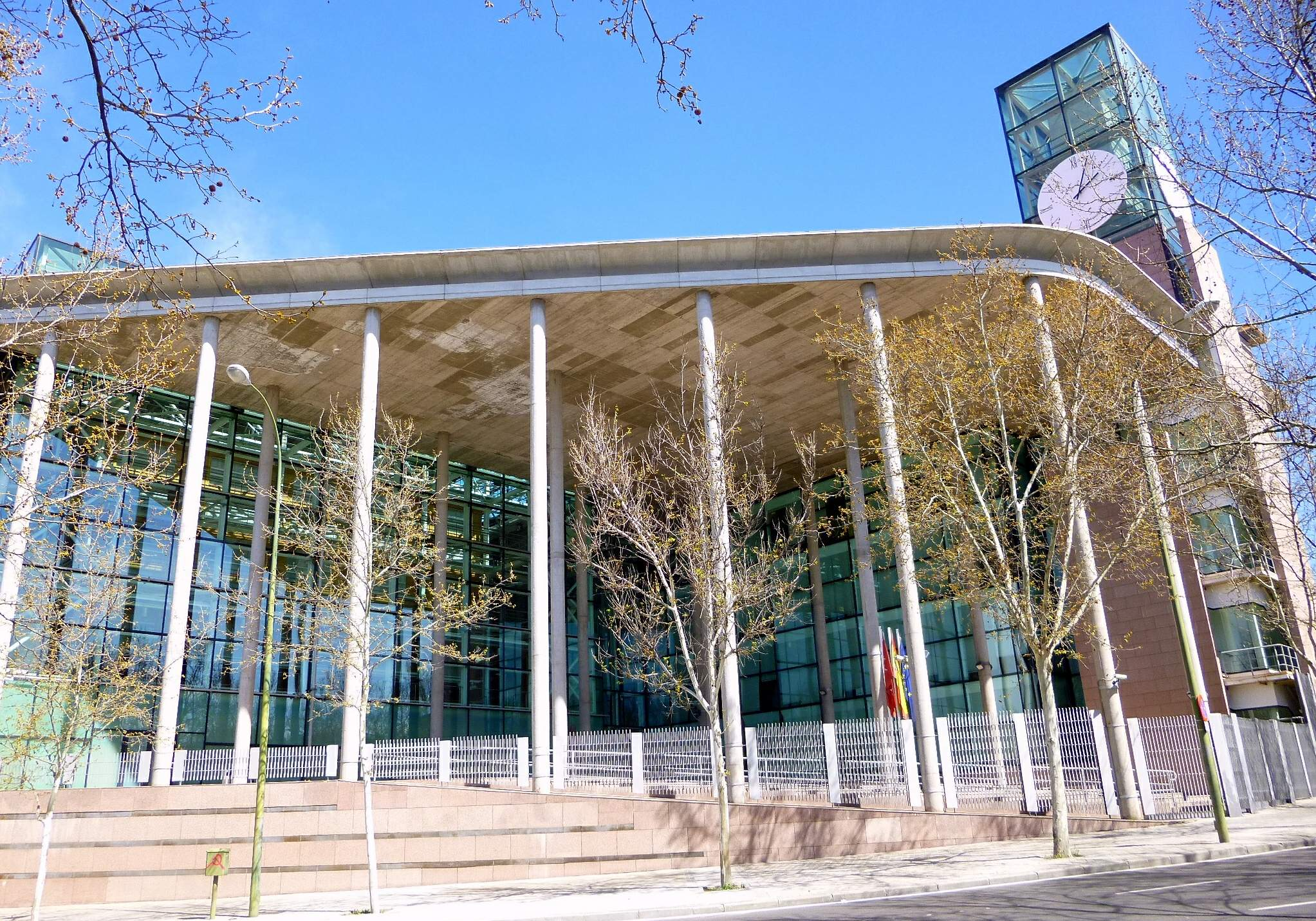 Sede de la Asamblea de la Comunidad de Madrid, en Puente de Vallecas, Madrid